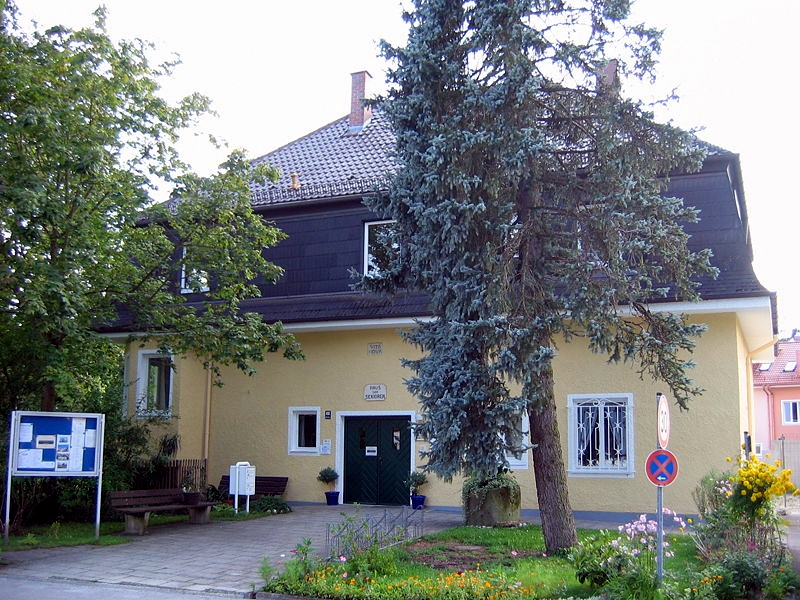 Altes Rathaus in Ottobrunn, erbaut als Wohnhaus von Ermanno Wolf-Ferrari